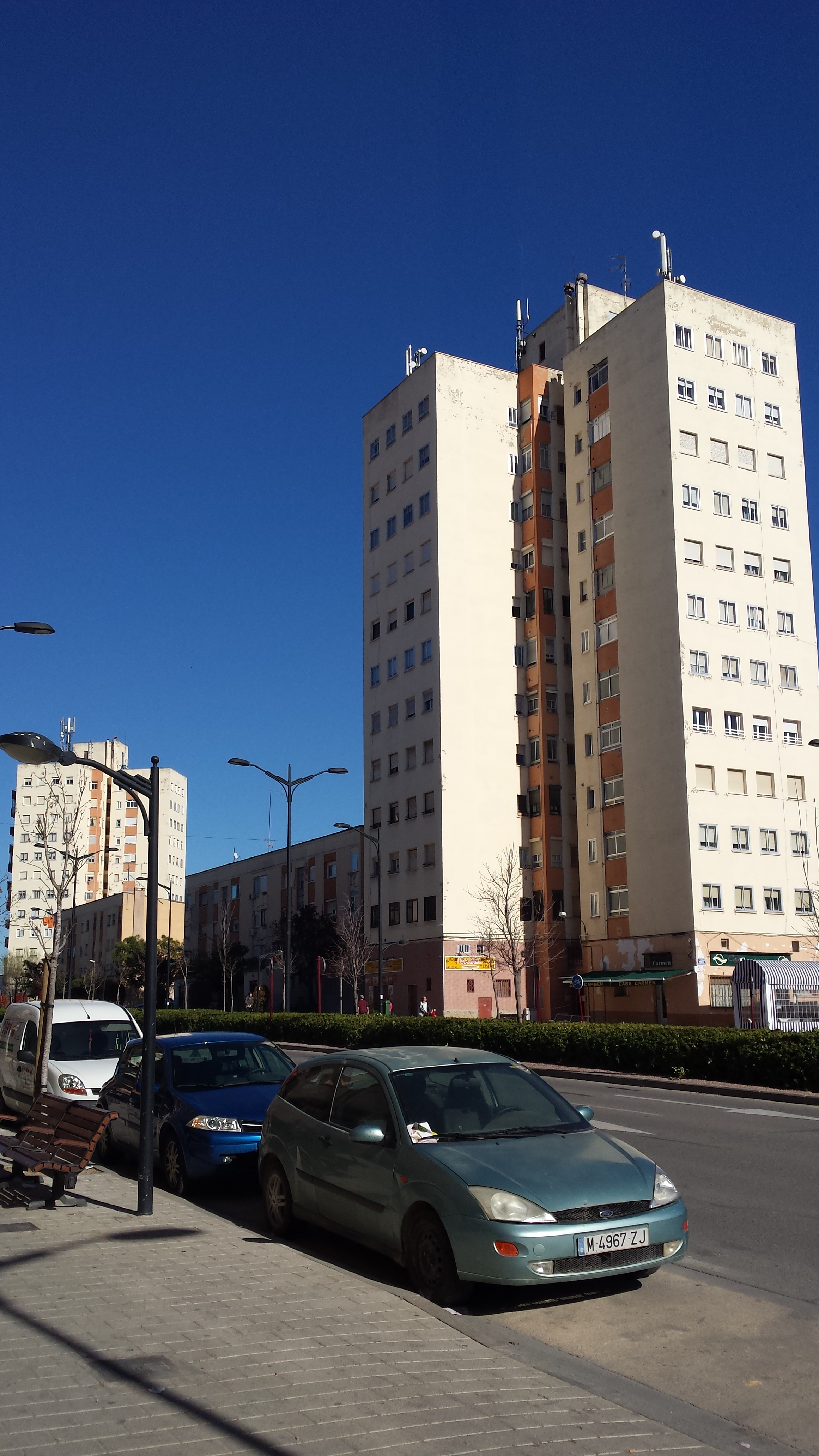 torres